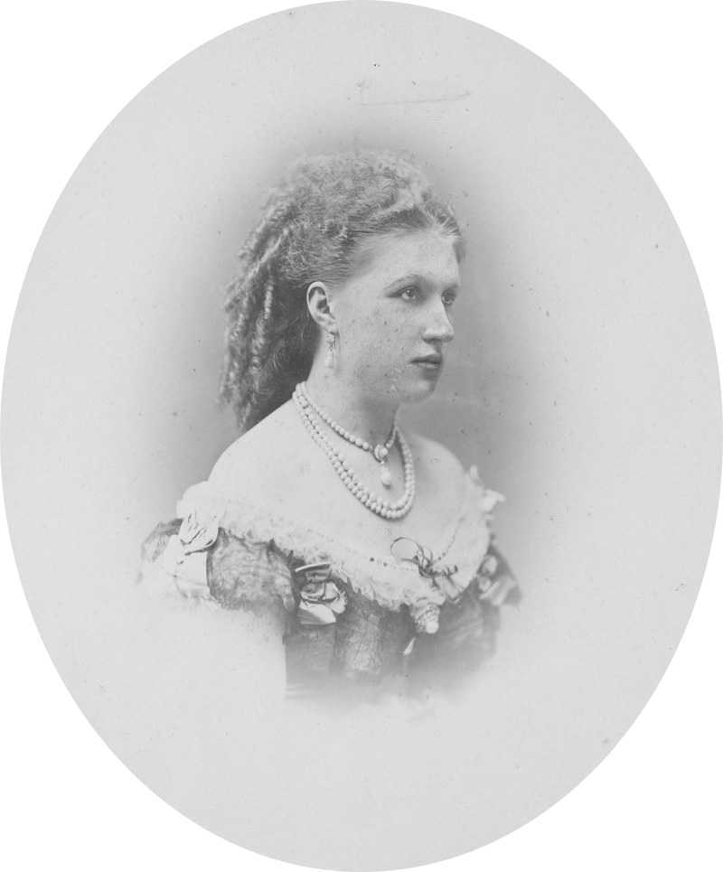 Großherzogin Marie von Mecklenburg-Schwerin.